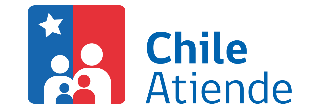 Departamento de Comunicaciones del Instituto de Previsión Social (IPS)